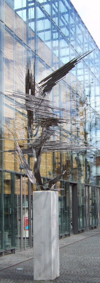 Norbert Kricke: Kräftebündel (1967) Standort: Rheinisches Landesmuseum Bonn, Colmantstraße Höhe: 8 m (Sockel: 2,70 m)